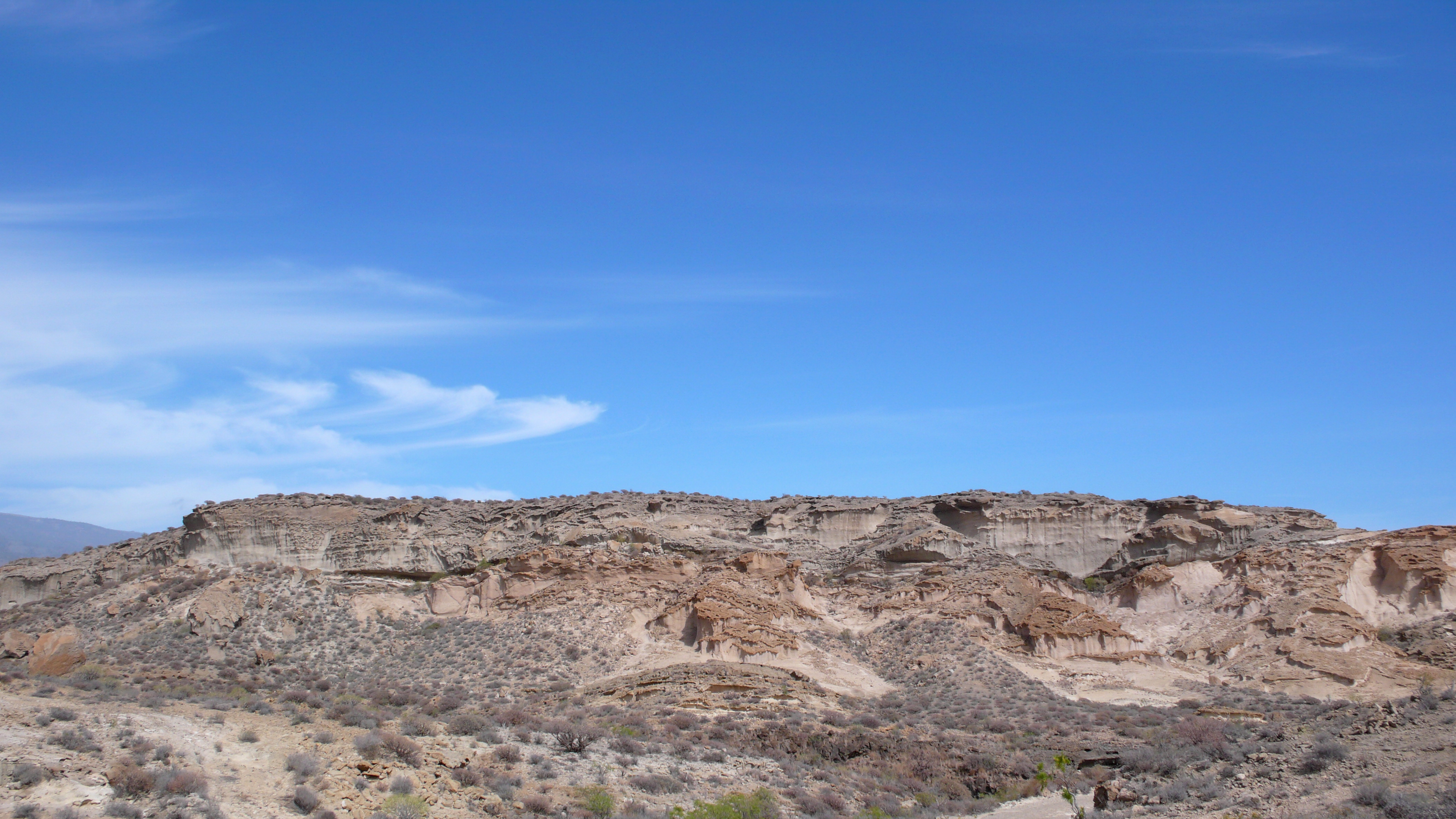 Paisaje del espacio protegido "Monumento Natural de Los Derriscaderos" en Granadilla de Abona